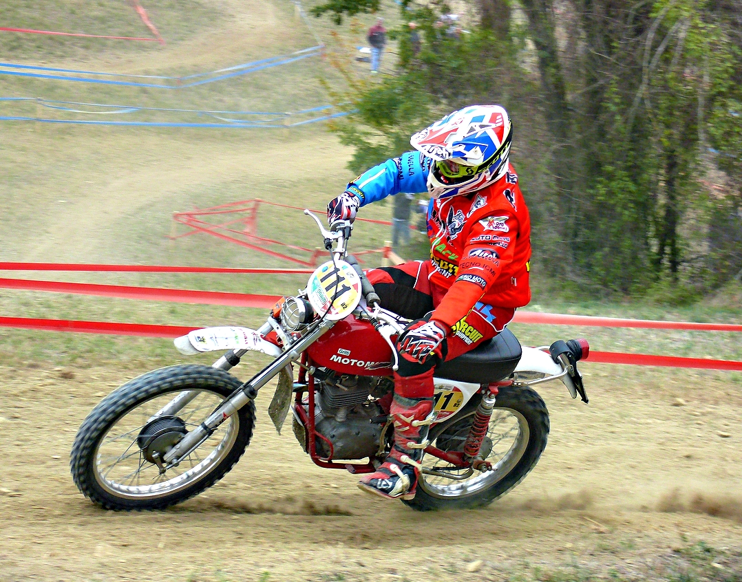 2017 Campionato Italiano Gruppo 5 Regolarità Epoca e Trofeo Testori. 7° Prova - Perino (PC) - Italia.